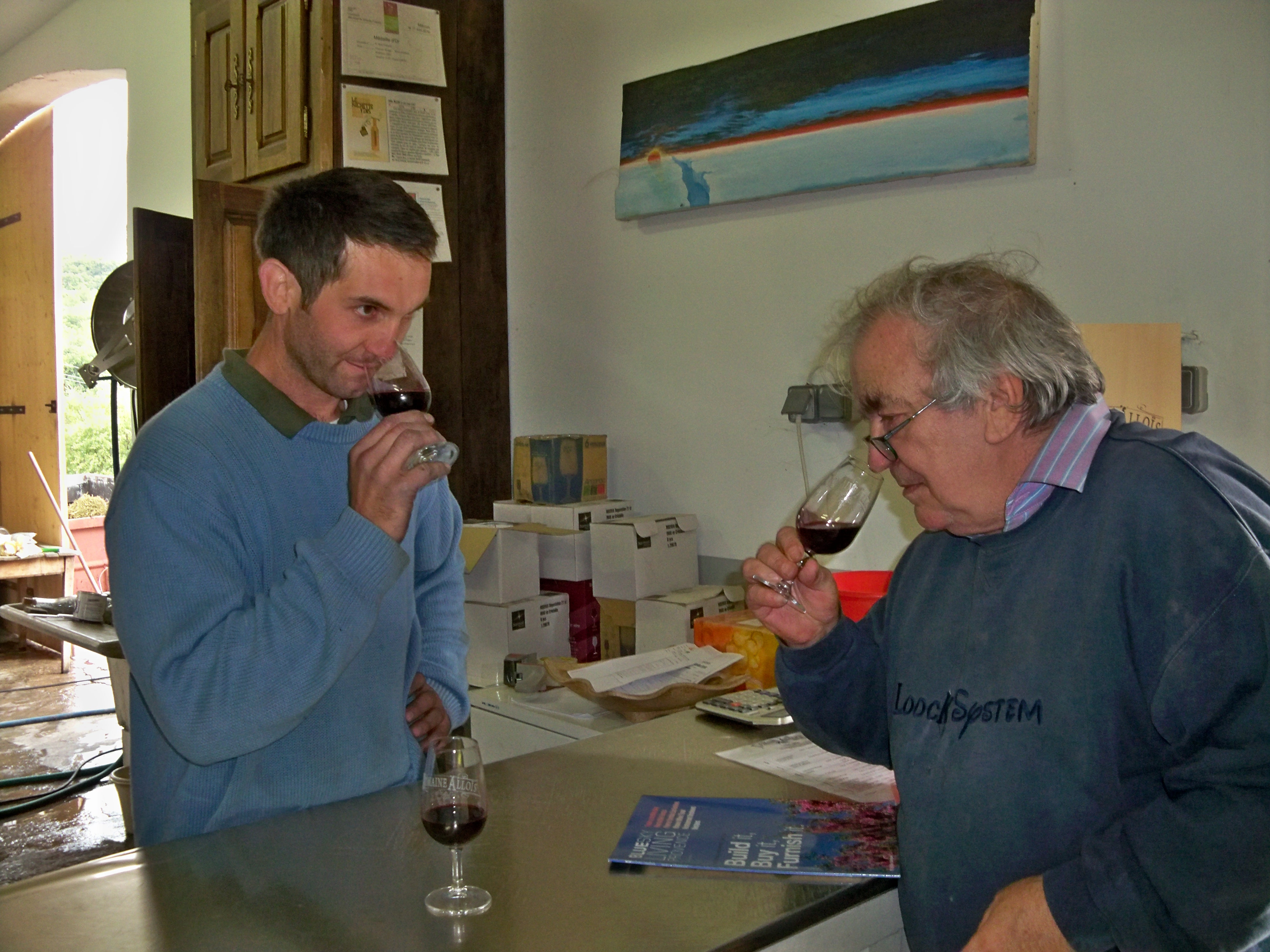 Humer le vin lors d'une dégustation en cave (Vaucluse, France)